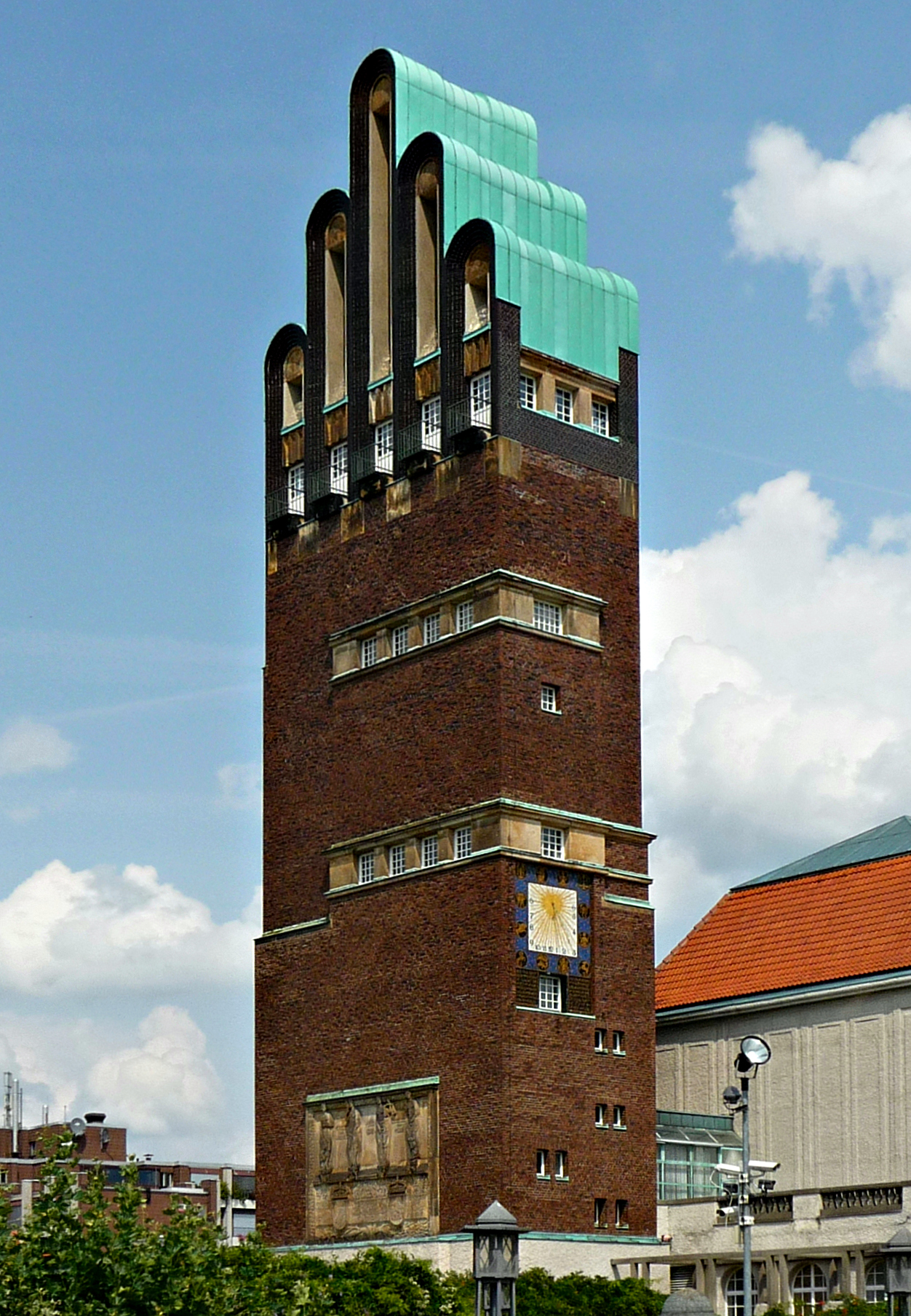 Der 48,5 Meter hohe Hochzeitsturm auf der Mathildenhöhe ist das Wahrzeichen der hessischen Stadt Darmstadt.